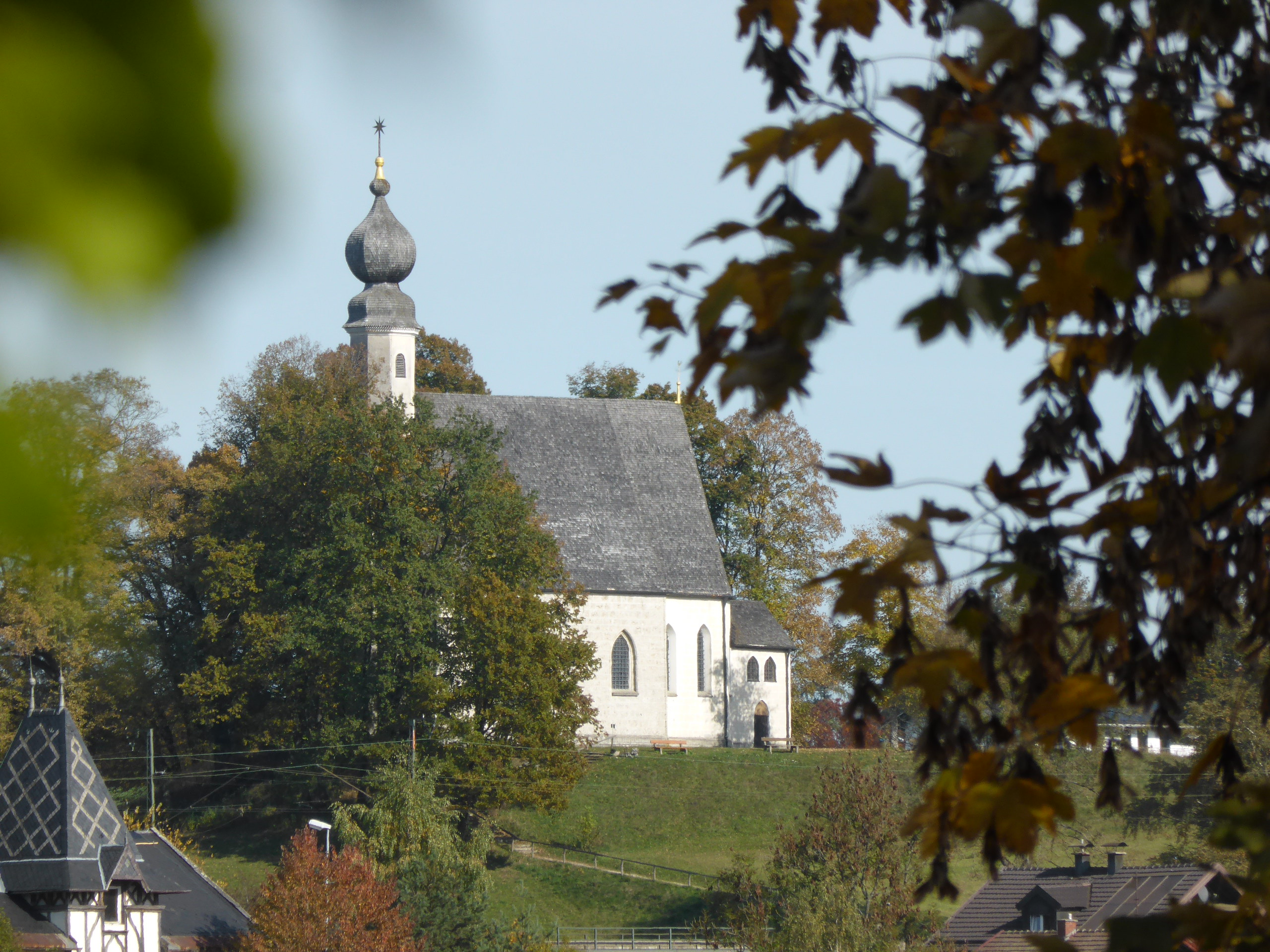 Kirche St. Vitus und Anna in Ettendorf, von Traunstein (Thomas-Bernhard-Stiege) aus gesehen.